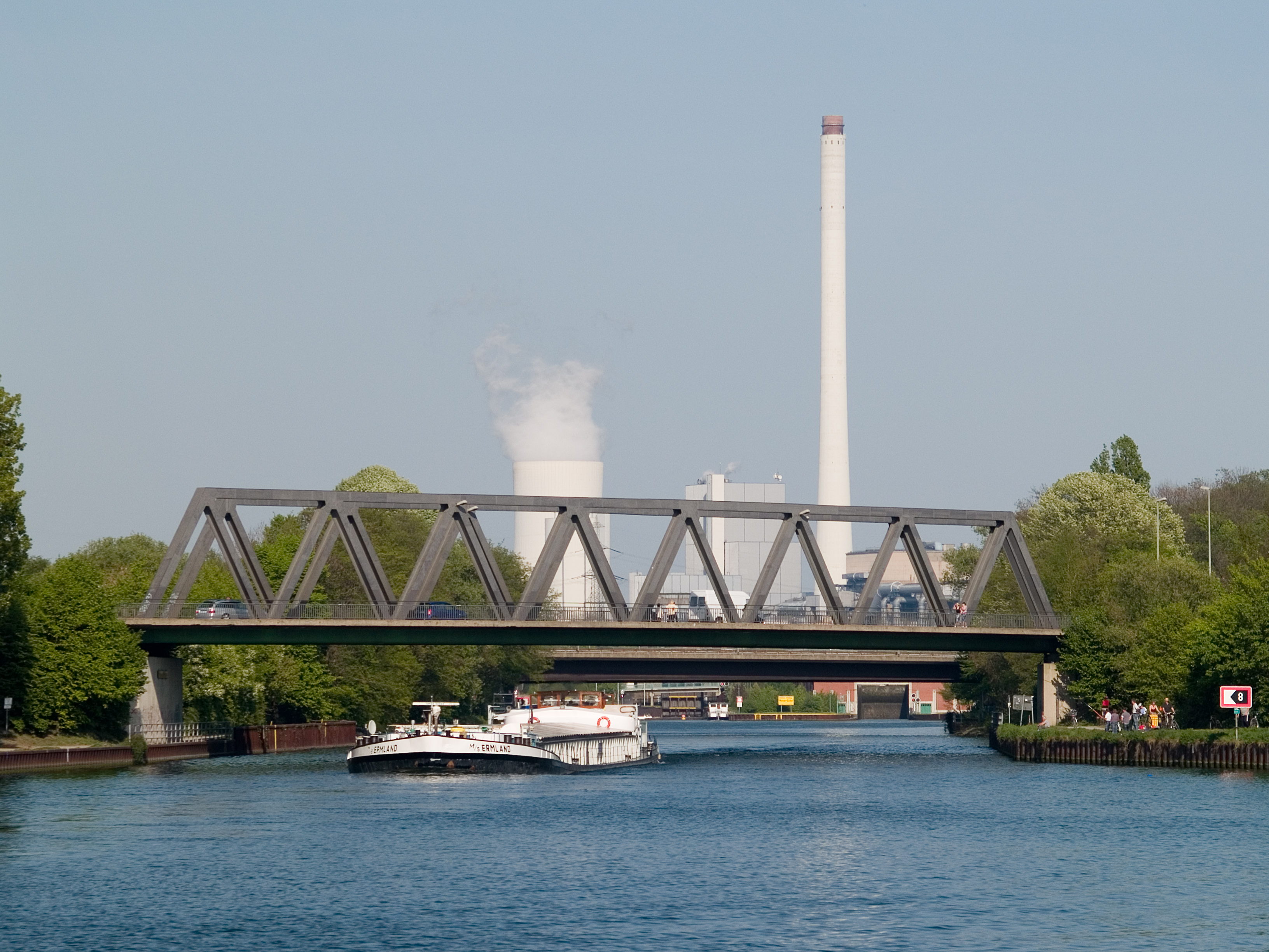 Rhein-Herne-Kanal, Brücke der B226 am unteren Vorhafen der Schleuse Wanne